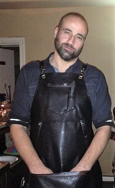 David Ortiz en el Baobab Cocktail Bar